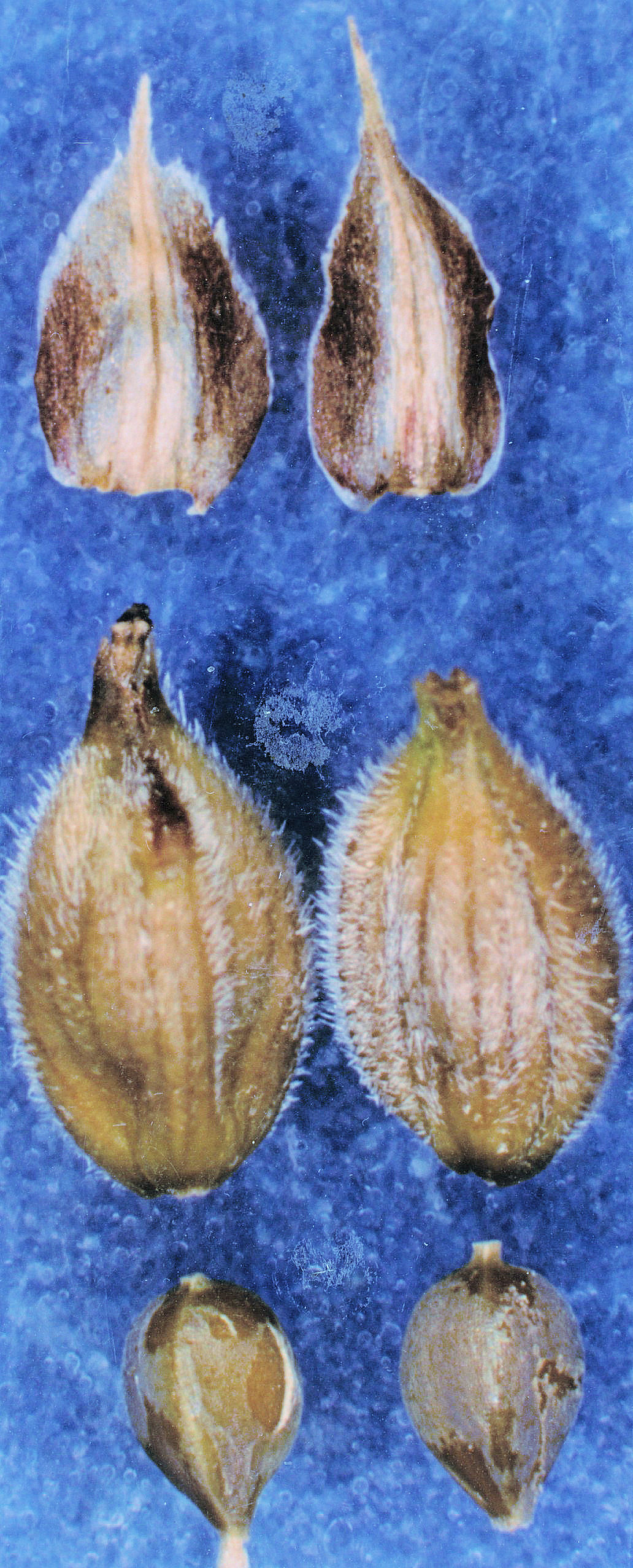 Carex lasiocarpa urntjes en vruchtjes